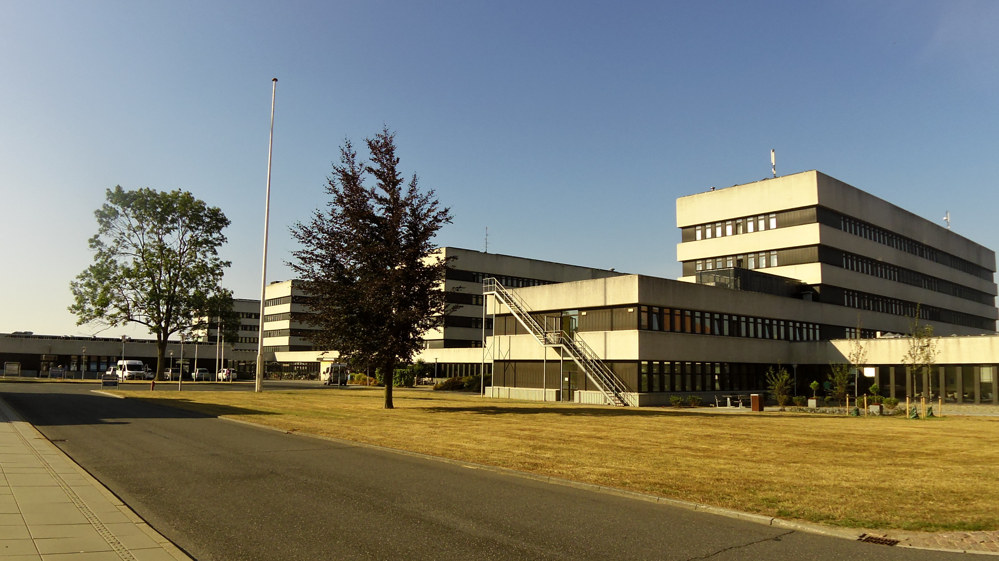 Sønderborg Sygehus